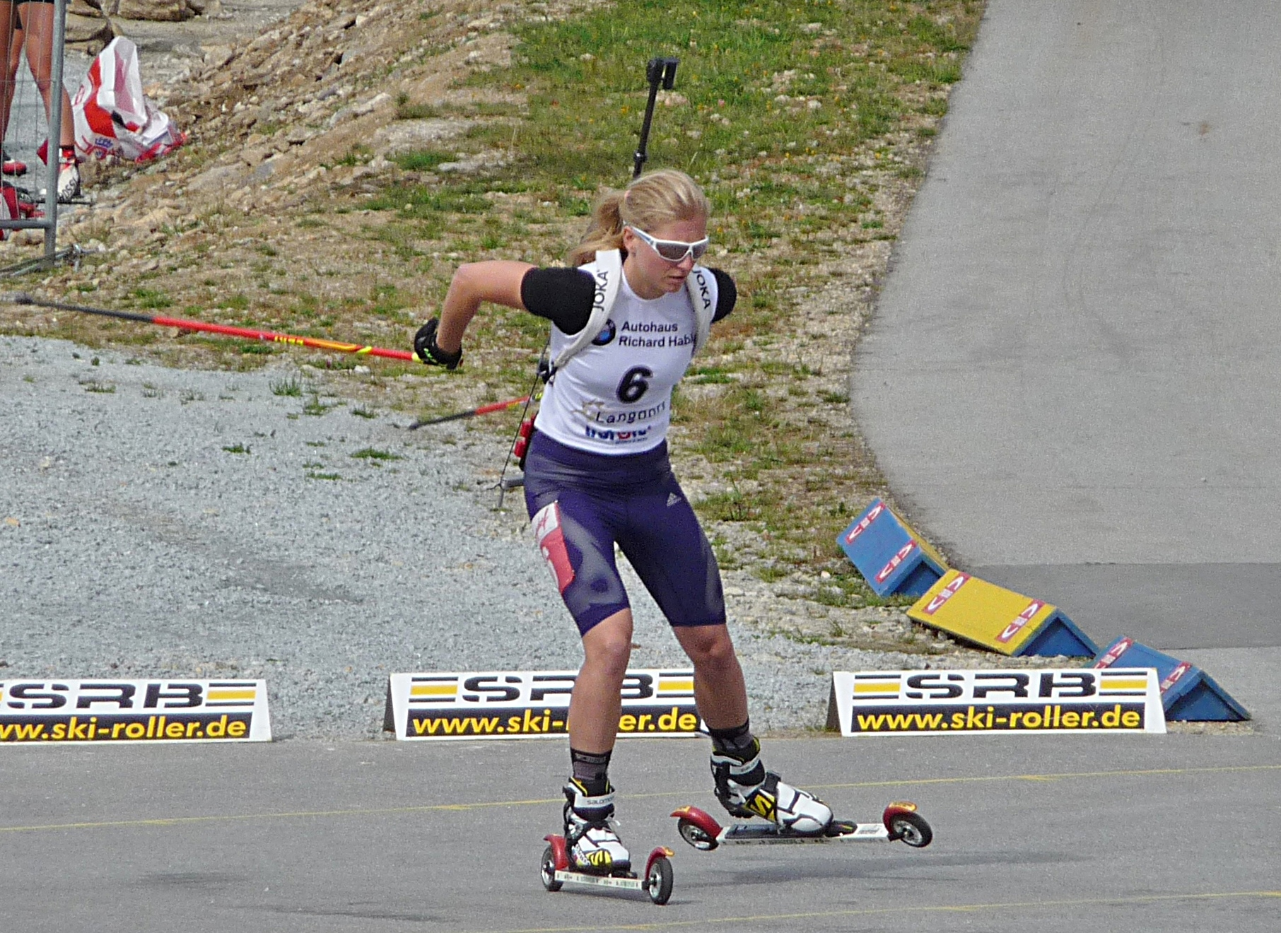 Franziska Hildebrand bei der Deutschen Biathlon-Meisterschaft 2015